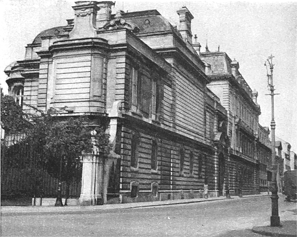 Palais Alfons (Alphonse) Rothschild bzw. Palais Nathaniel Rothschild, 1040 Wien.